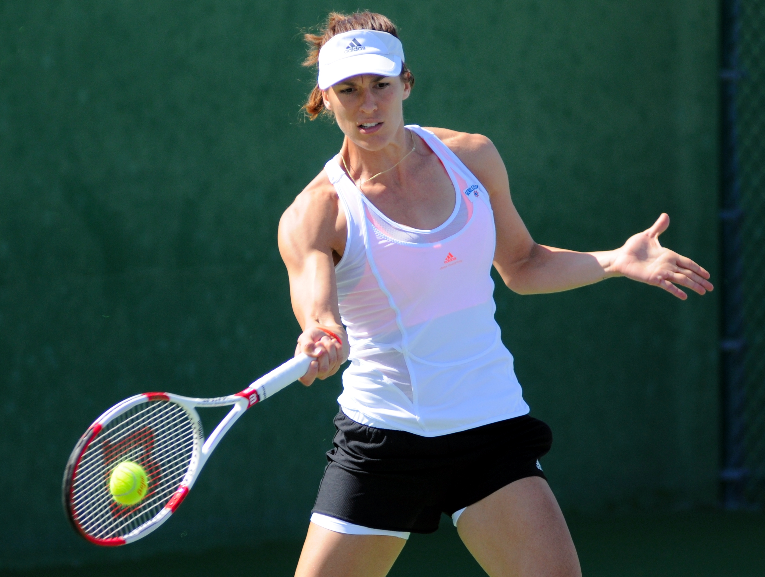 2014 BNP Paribas Open